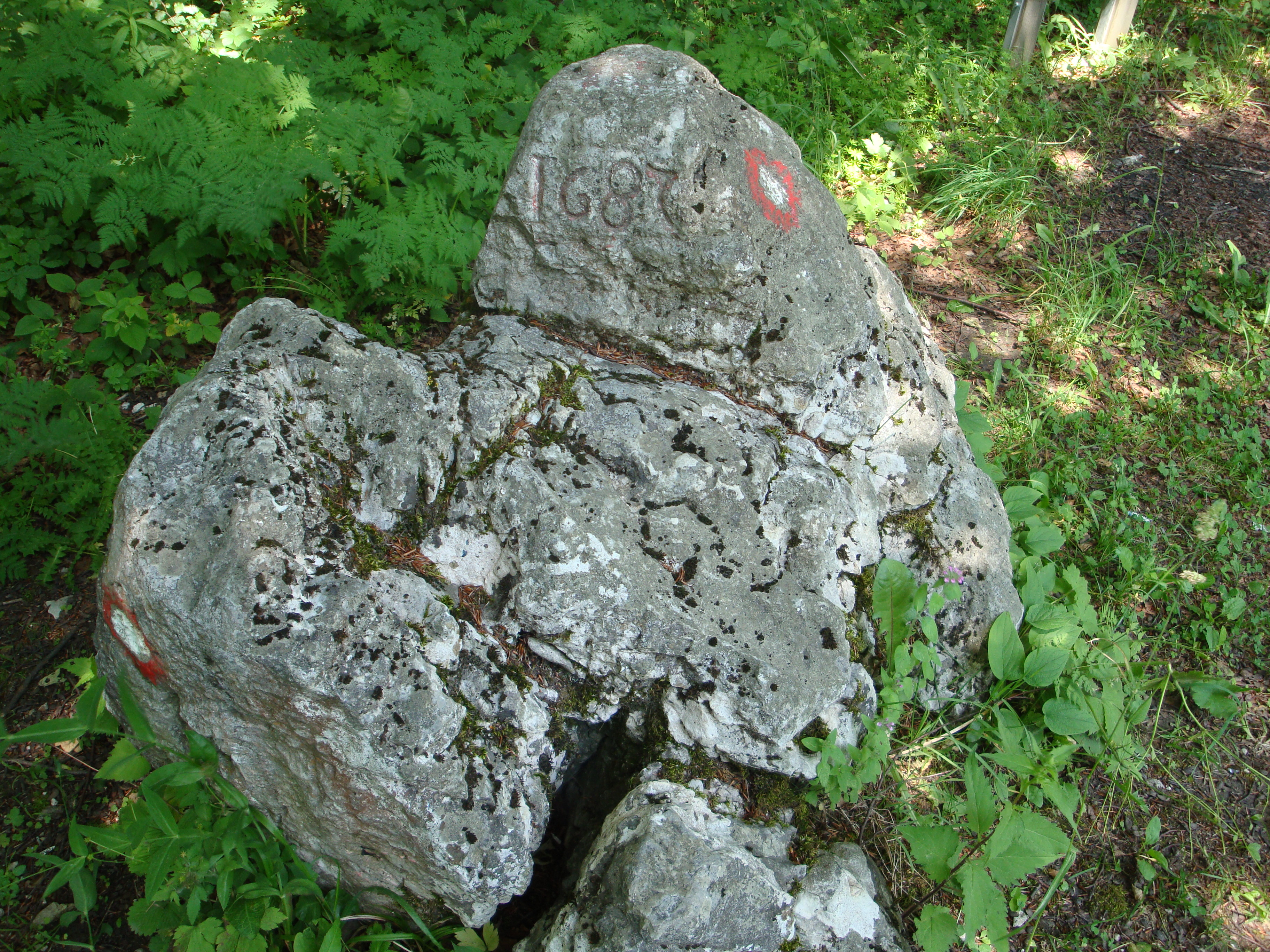 Krvavi kamen.